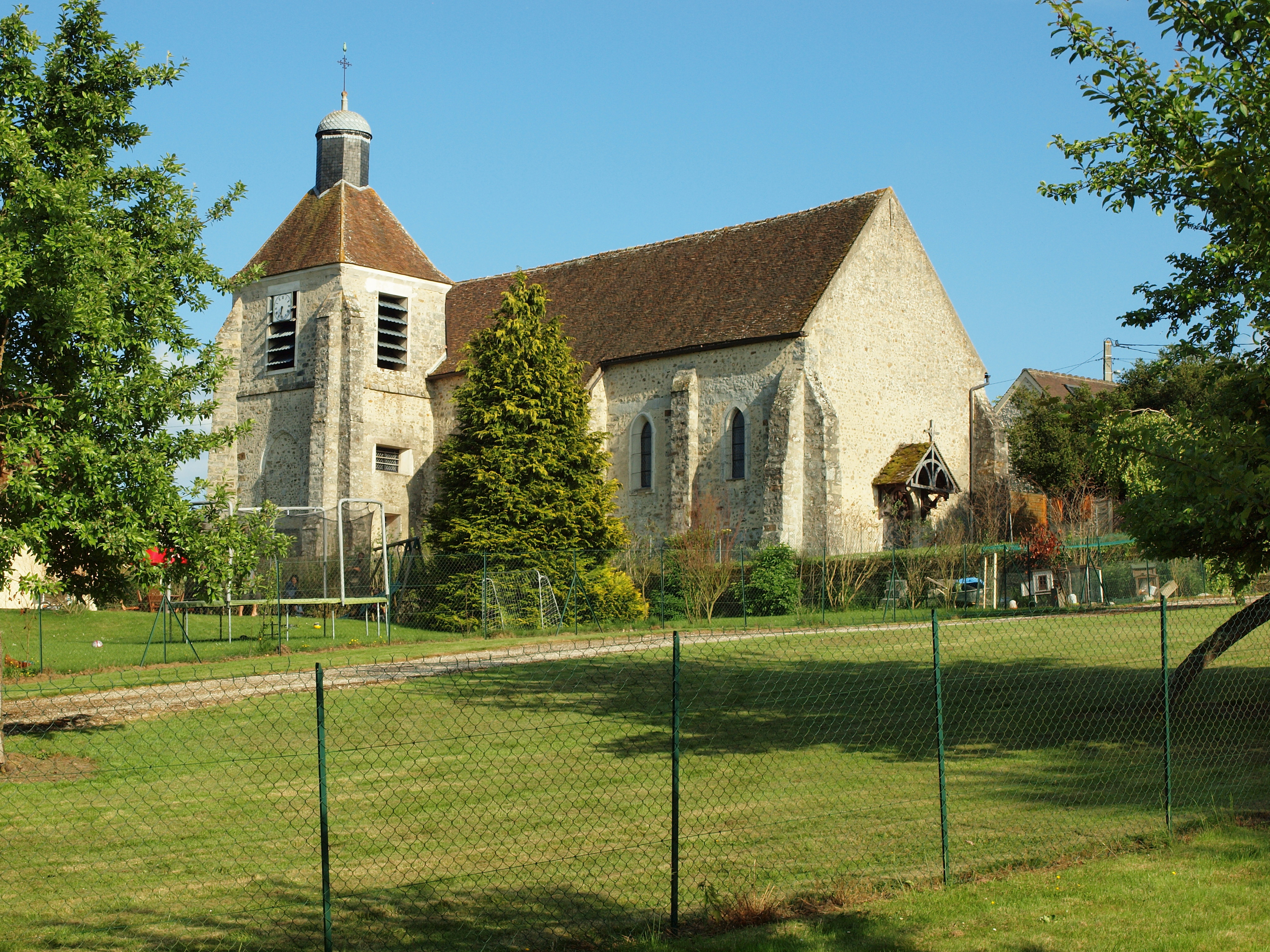 Église Saint-Gengoult de Vaux-sur-Lunain 5seine-et-Marne, France)